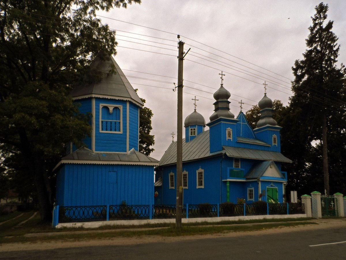 Дзівін. Свята-Параскева-Пятніцкая царква